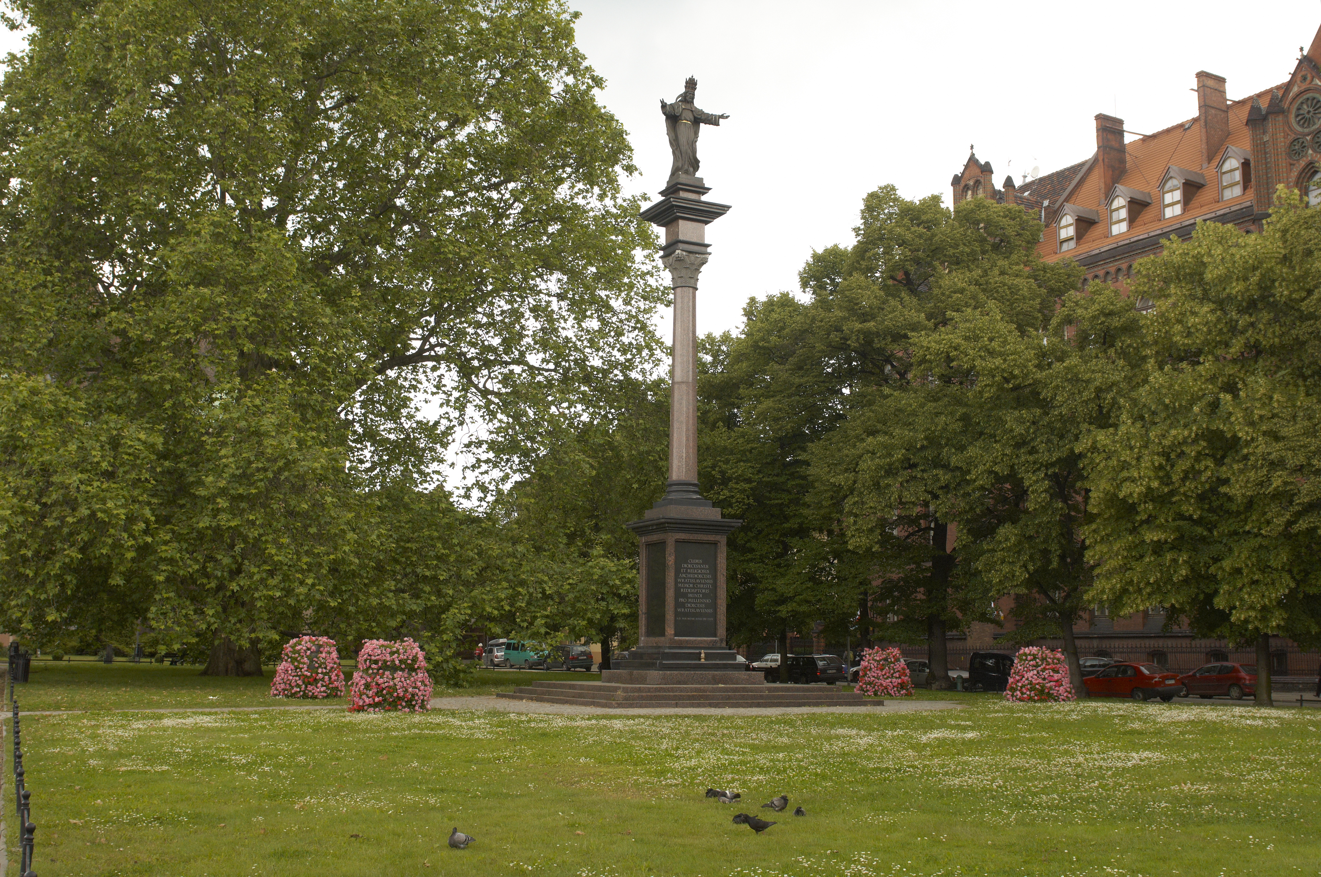 Kolumna Chrystusa Króla Wszechświata, pl. Katedralny, Wrocław